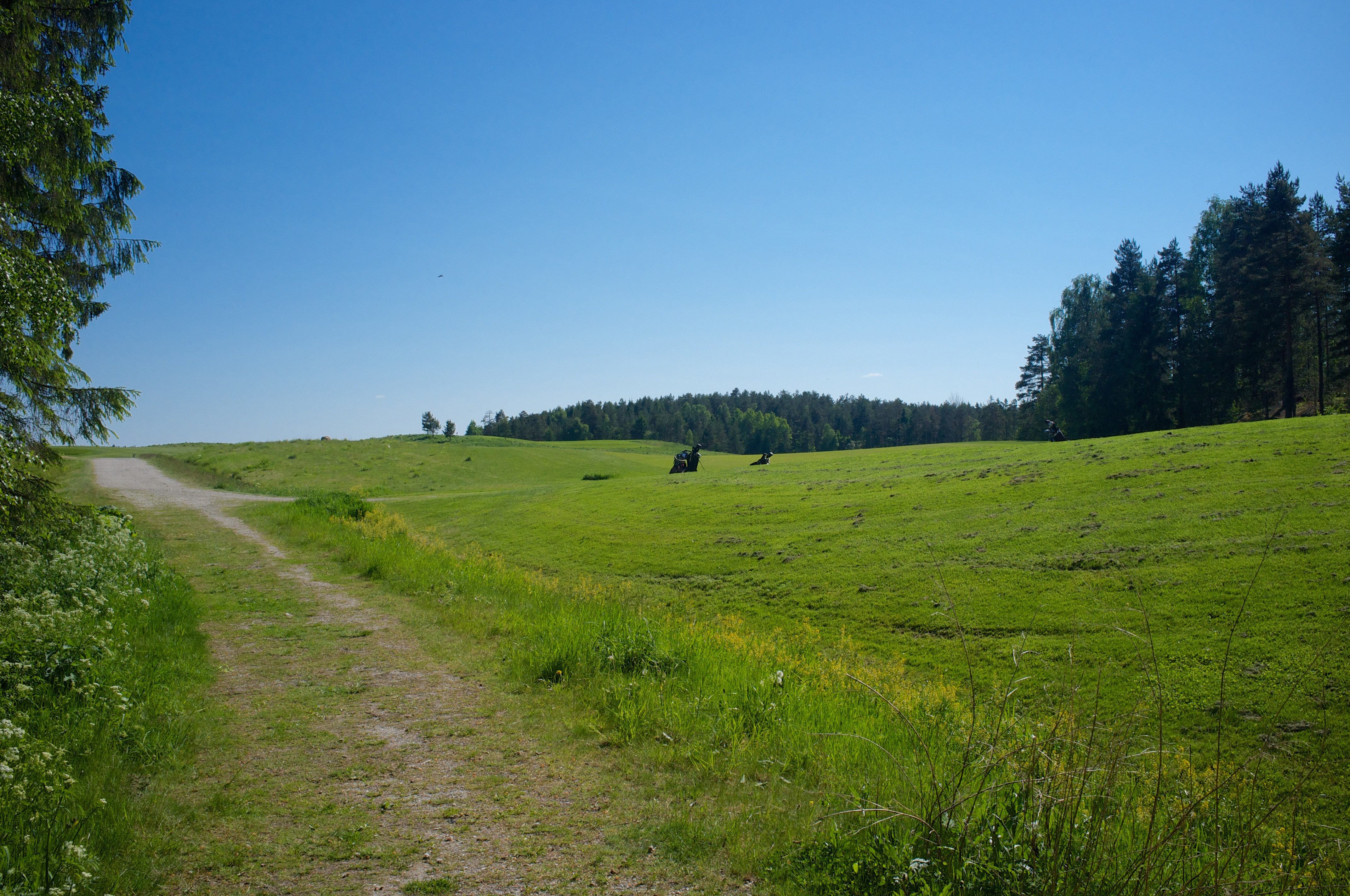 Grønmo Golfklubb i Oslo.